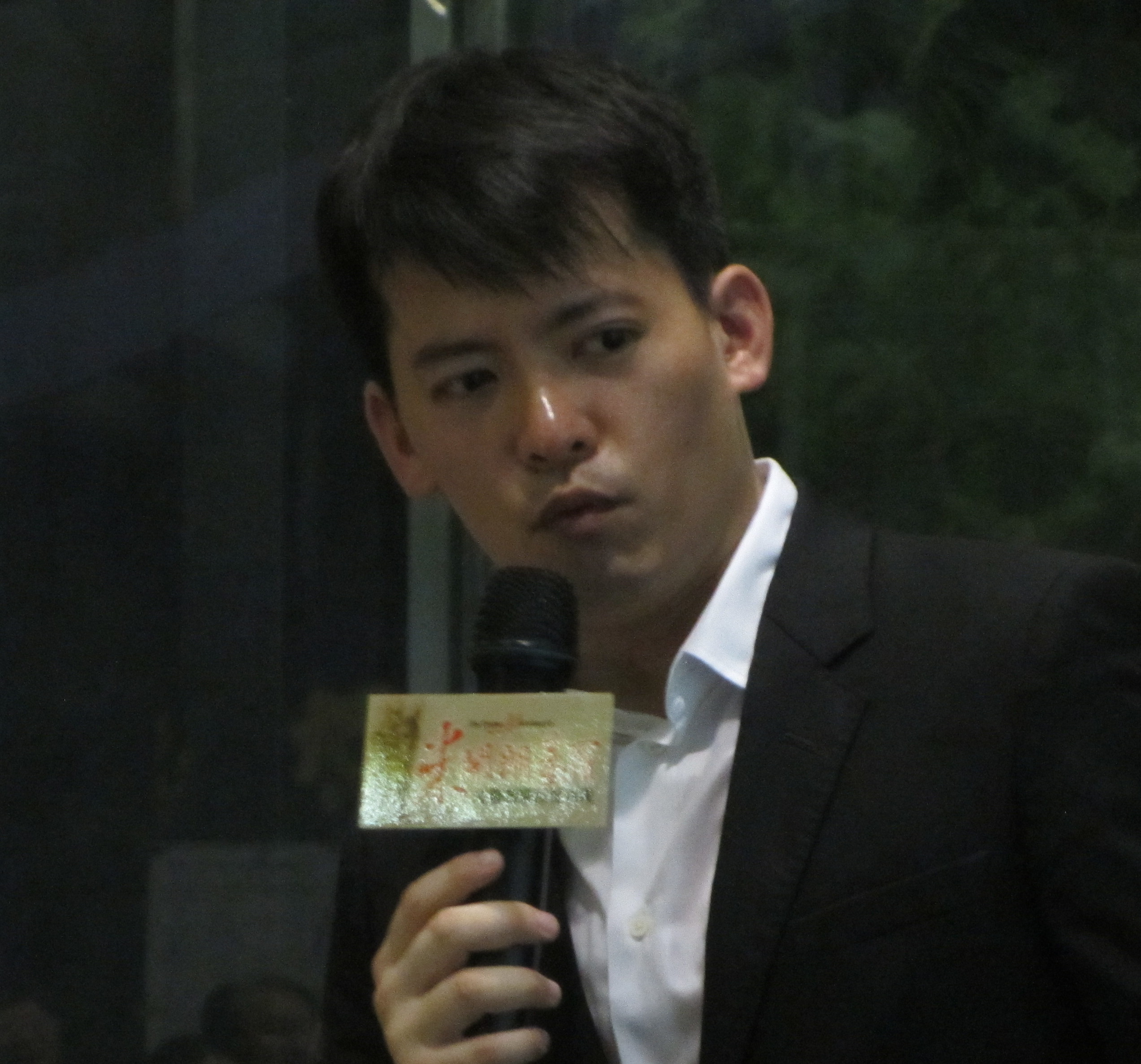 在高雄捷運中央公園站演講的謝哲青，2013年。